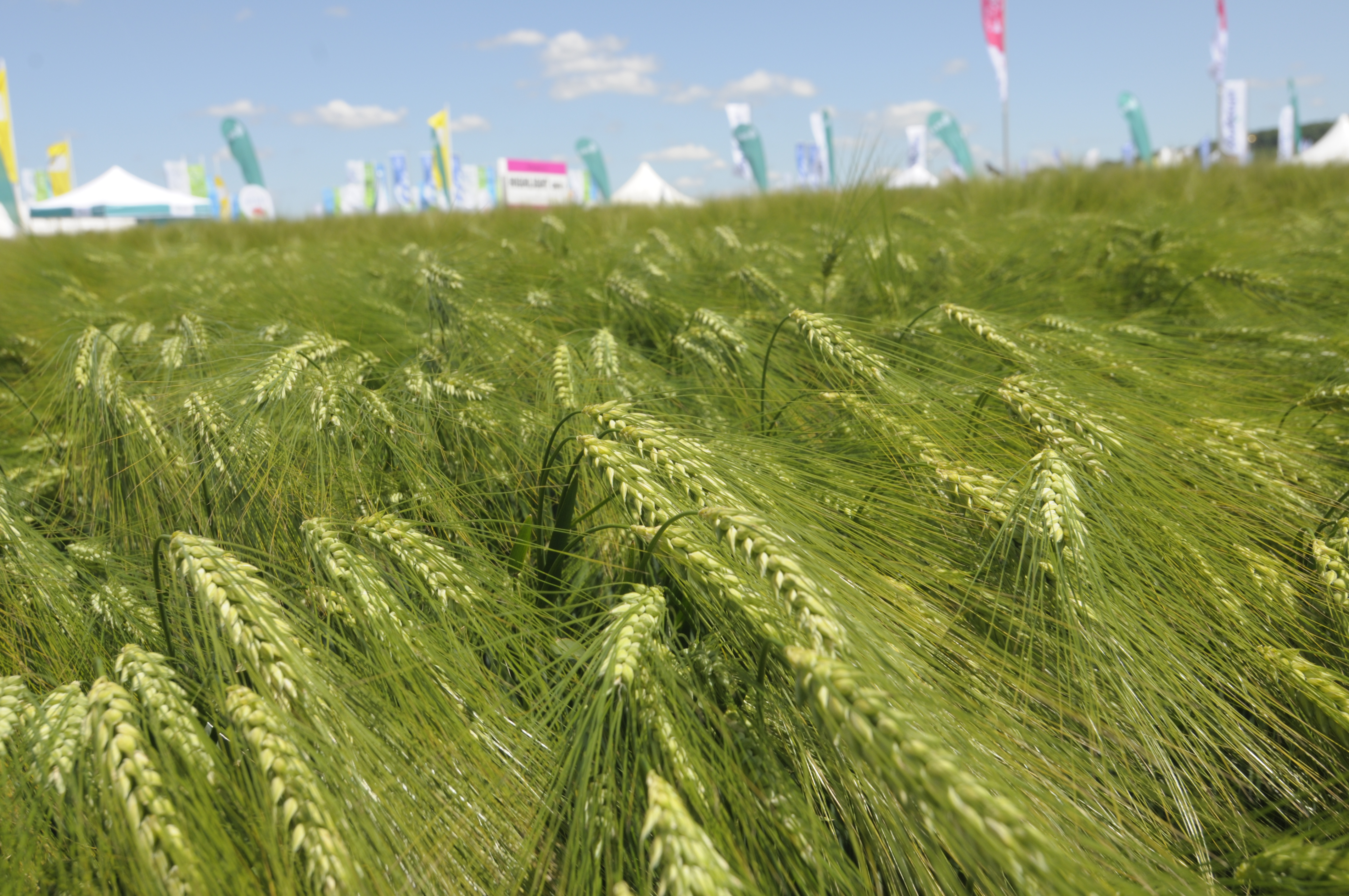 Wintergerstesorte SANDRA auf den DLG-Feldtagen 2012